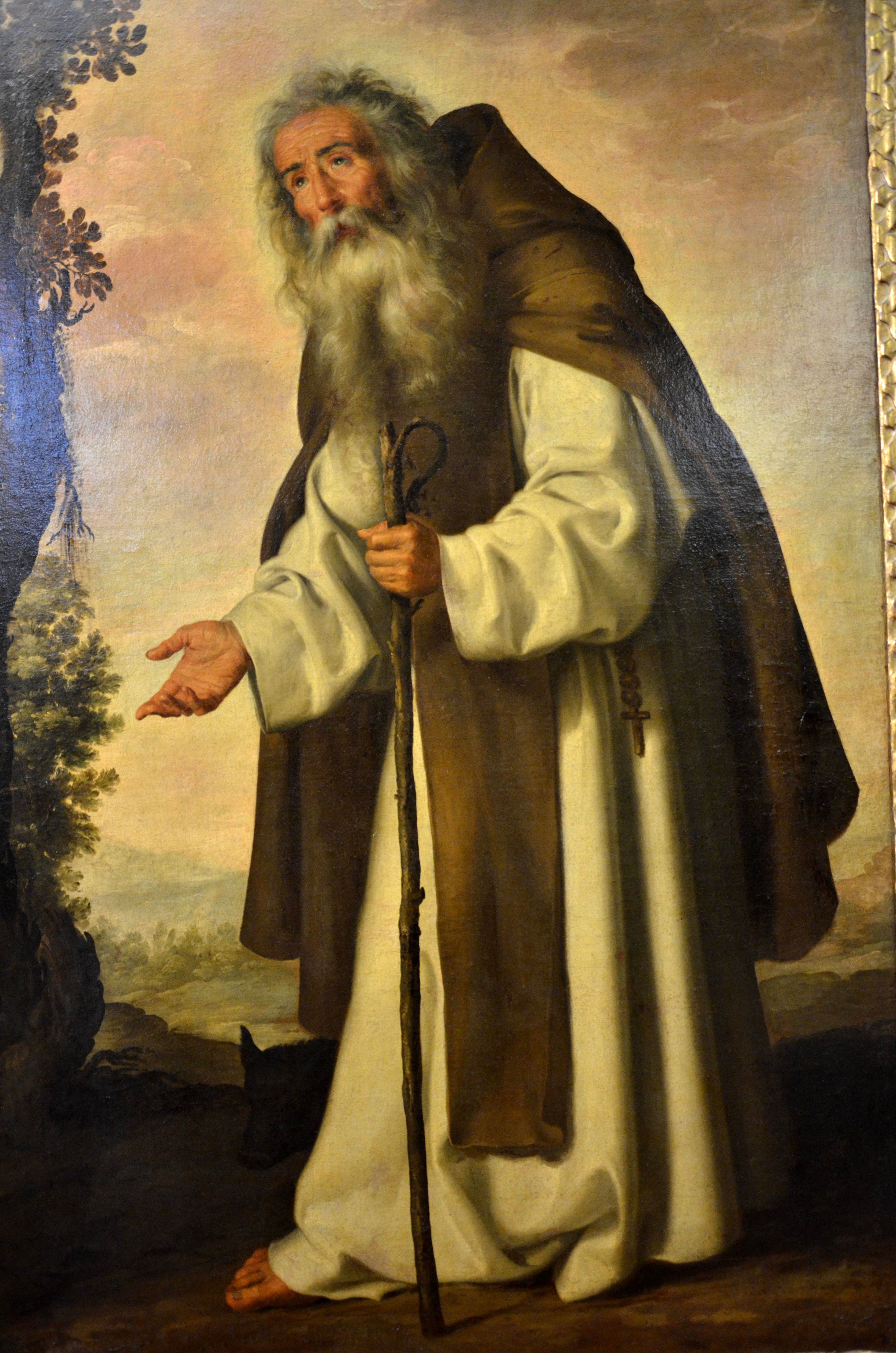 1640 Francisco-de-Zurbaran Saint-Anthony-the-Abbot